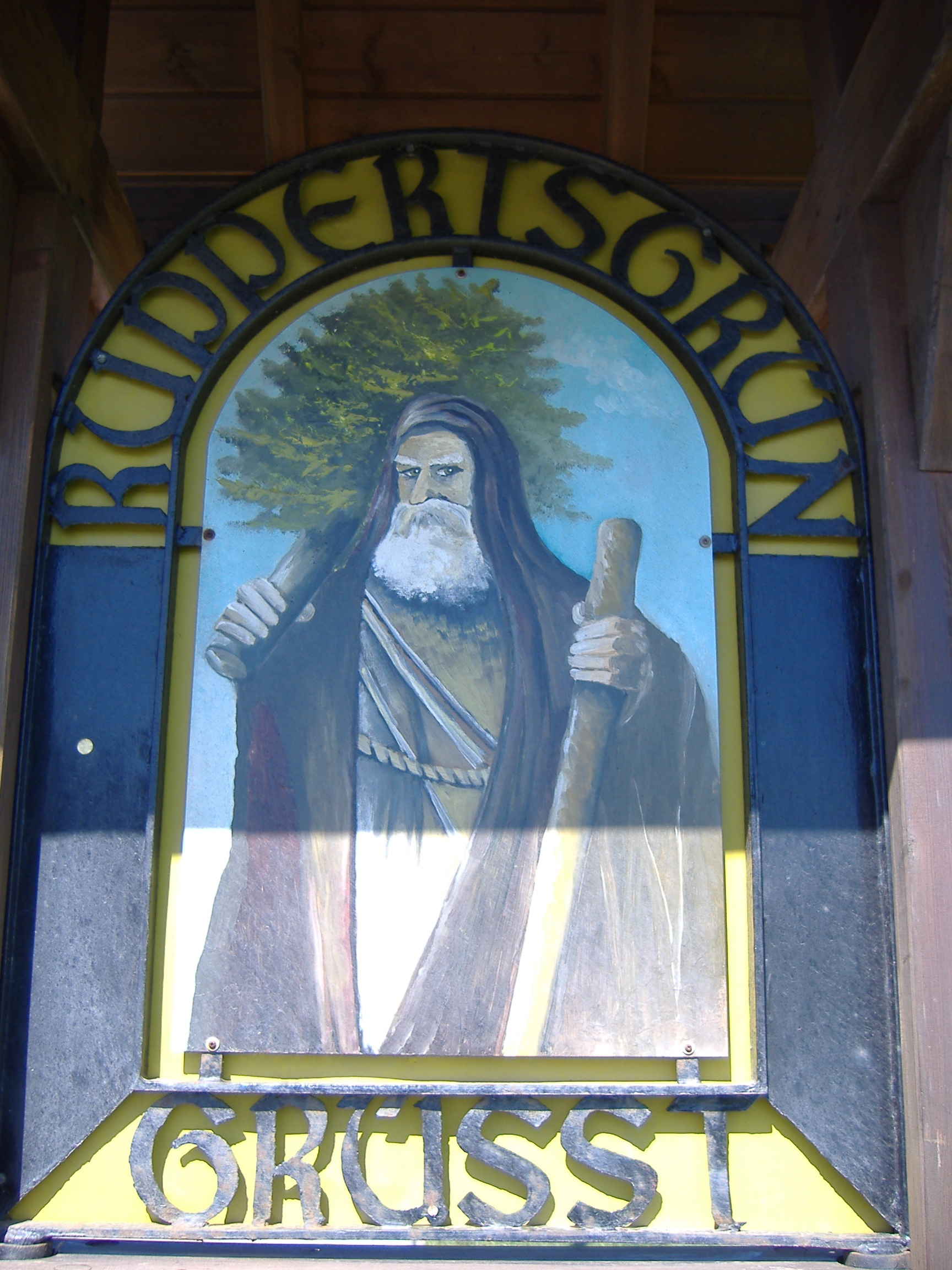 Bild am Ortseingang zu Ruppertsgrün (Fraureuth), Sachsen.